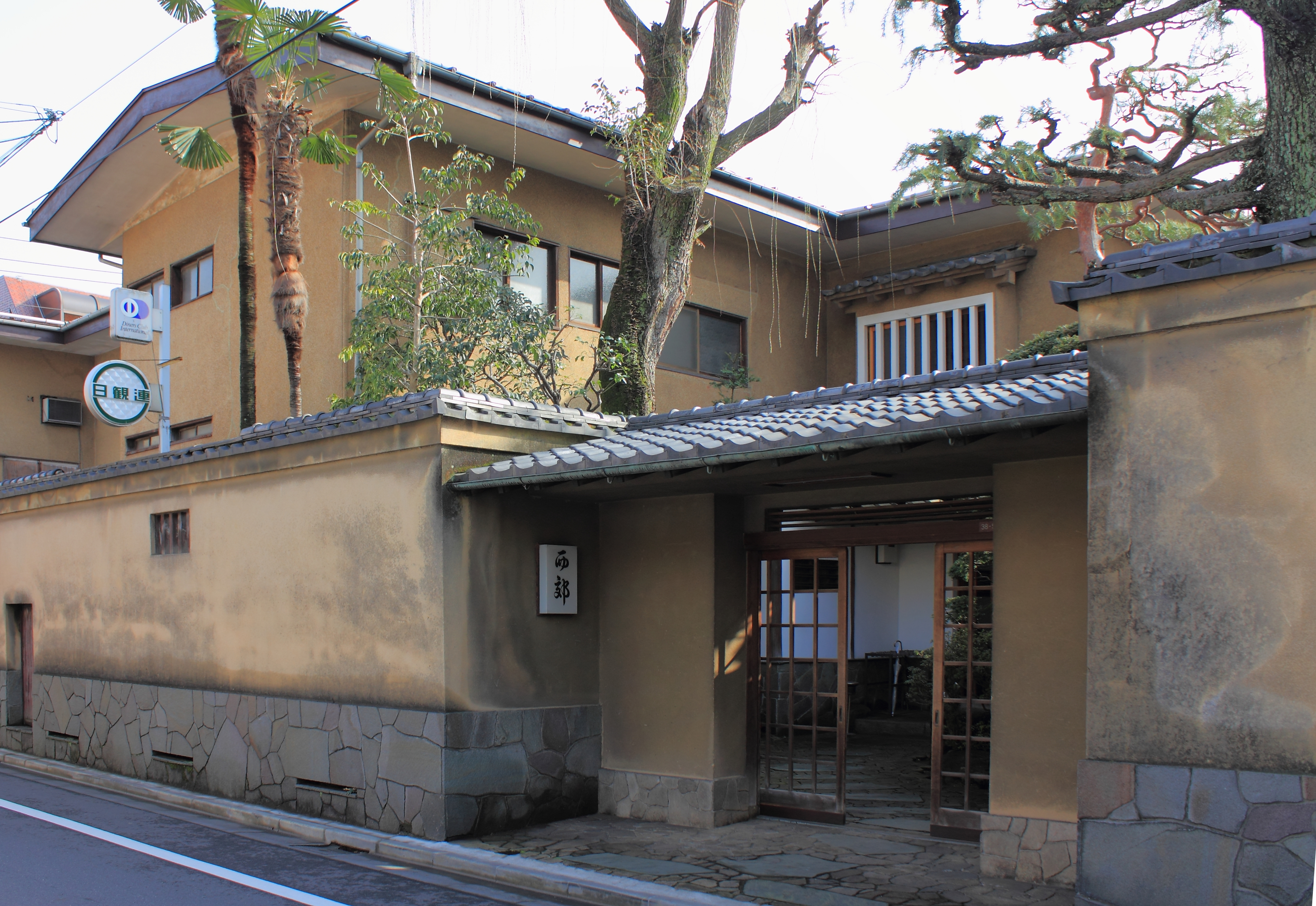 旅館西郊本館（国登録有形文化財・東京都杉並区）